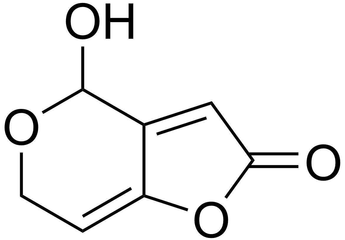 chemical structure of patulin